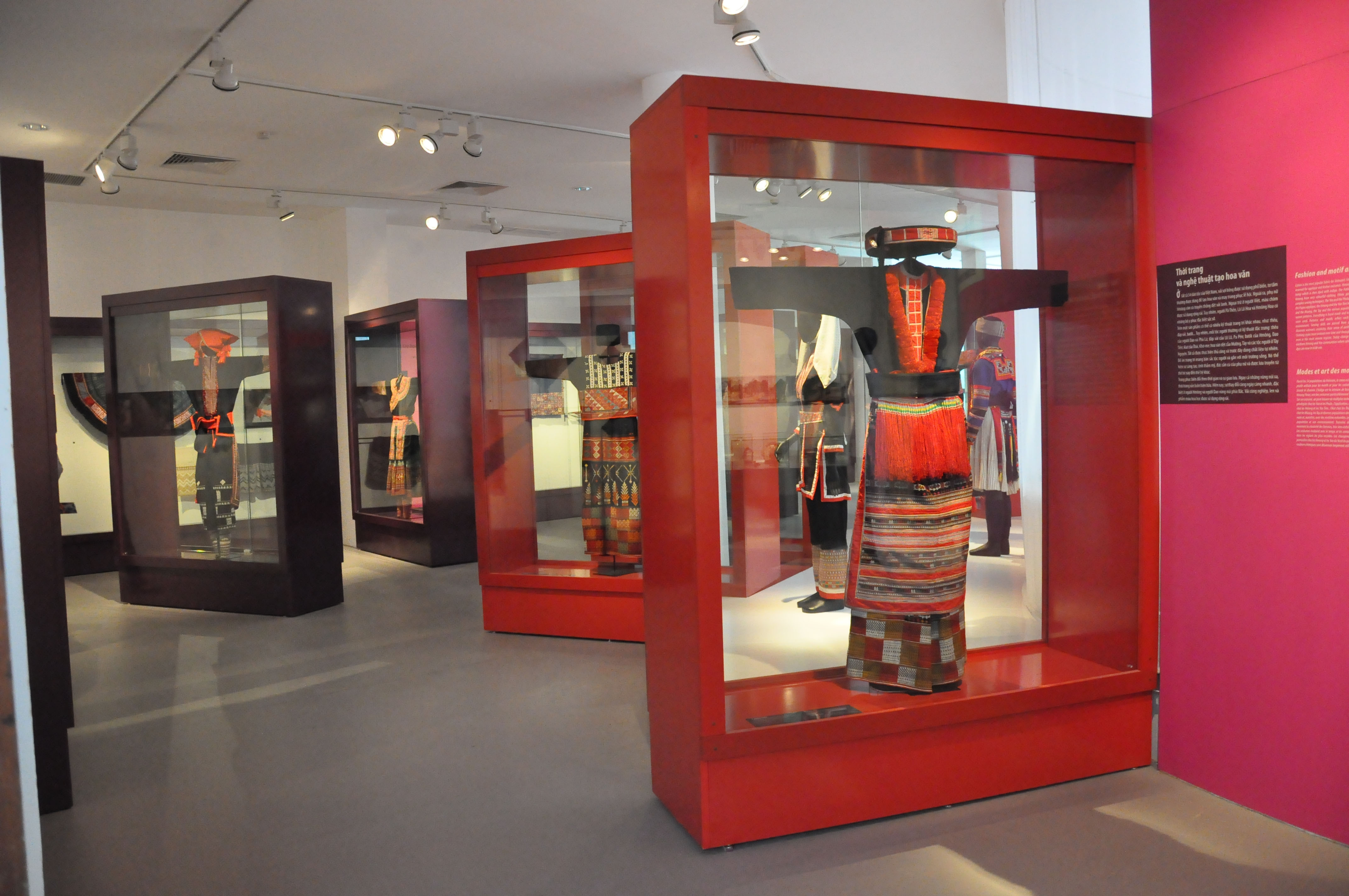 Thời trang nữ